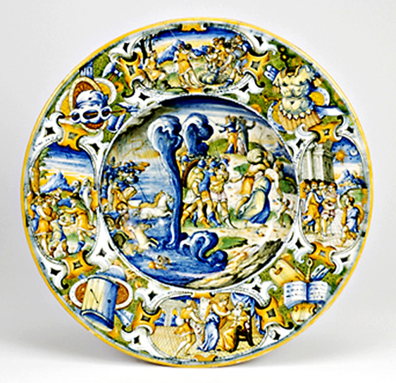 Maiolica veneziana del XVI secolo. Maestro Domenico.